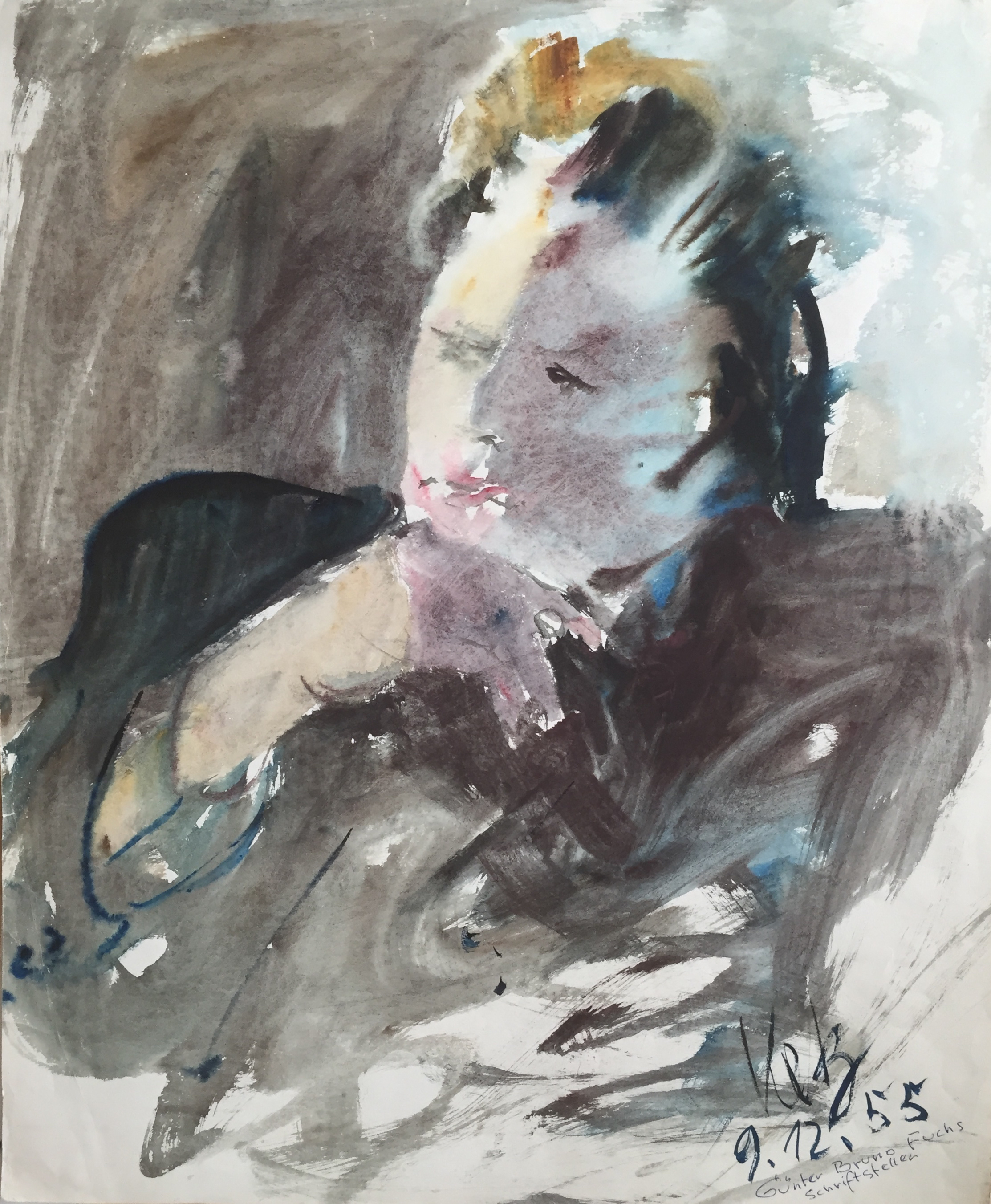 Fritz Ketz, Portrait Günter Bruno Fuchs 1955